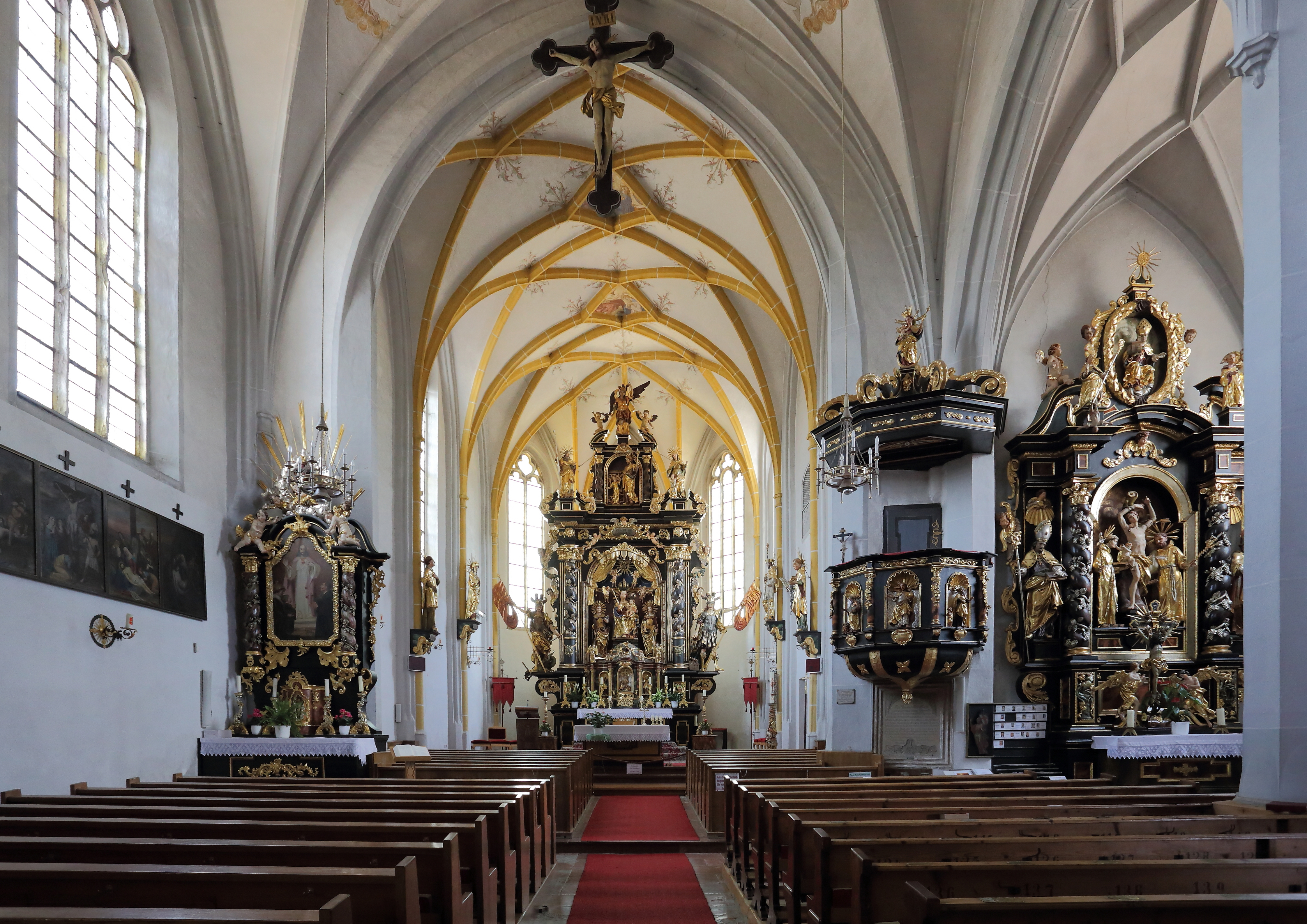 Innenansicht der katholischen Pfarrkirche Mariä Himmelfahrt in der oberösterreichischen Gemeinde Waldzell.